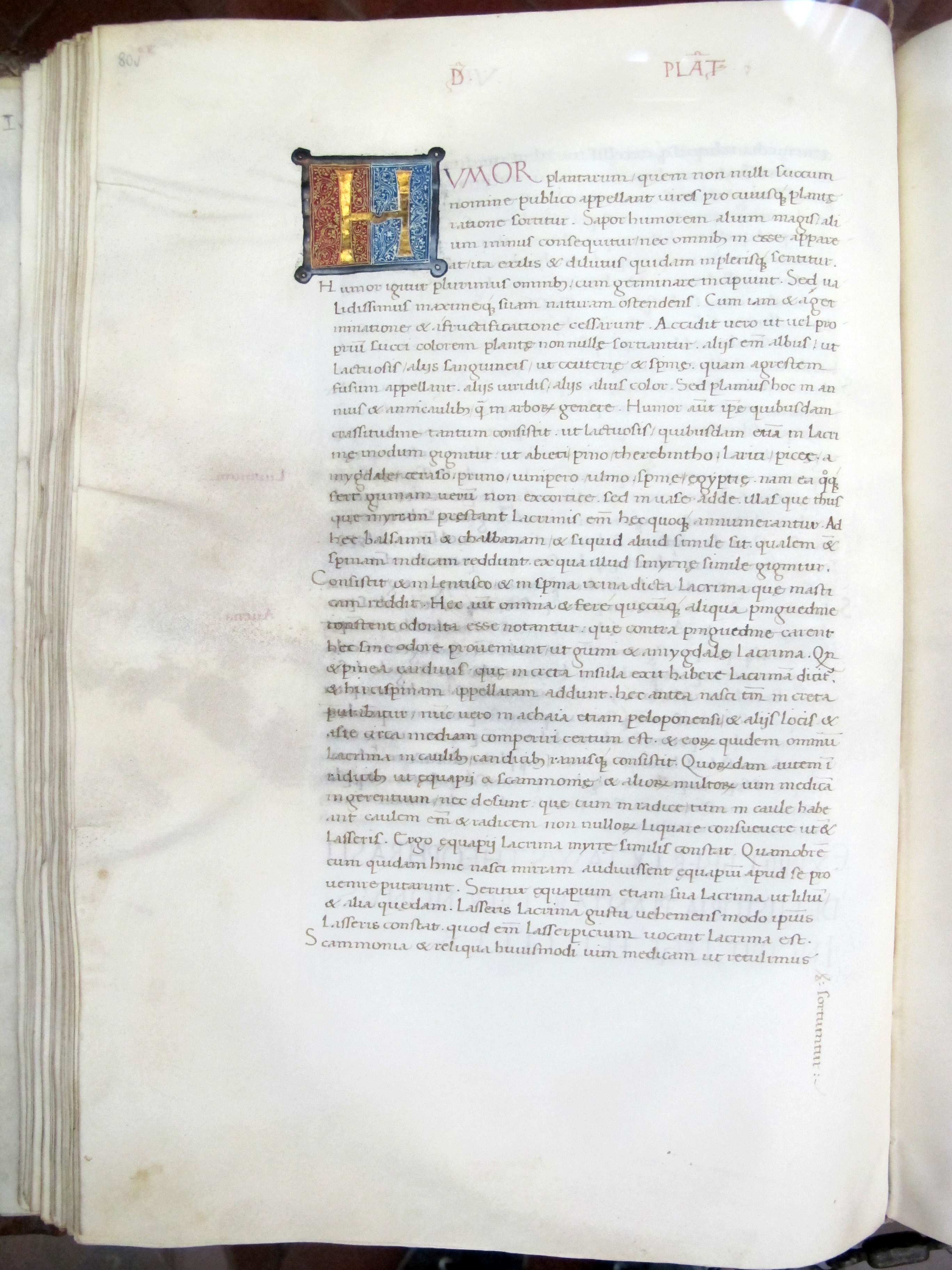 Biblioteca Malatestiana - MIBAC This is a photo of a monument which is part of cultural heritage of Italy.